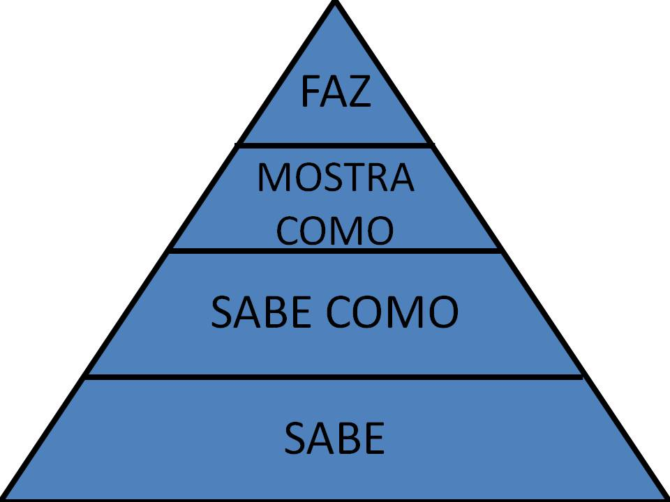 Baseado no artigo Miller, GE. (1990). "The assessment of clinical skills/competence/performance" (em inglês). Academic Medicine 65 (9): s63-s67. Em português.